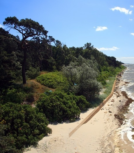 Jurata